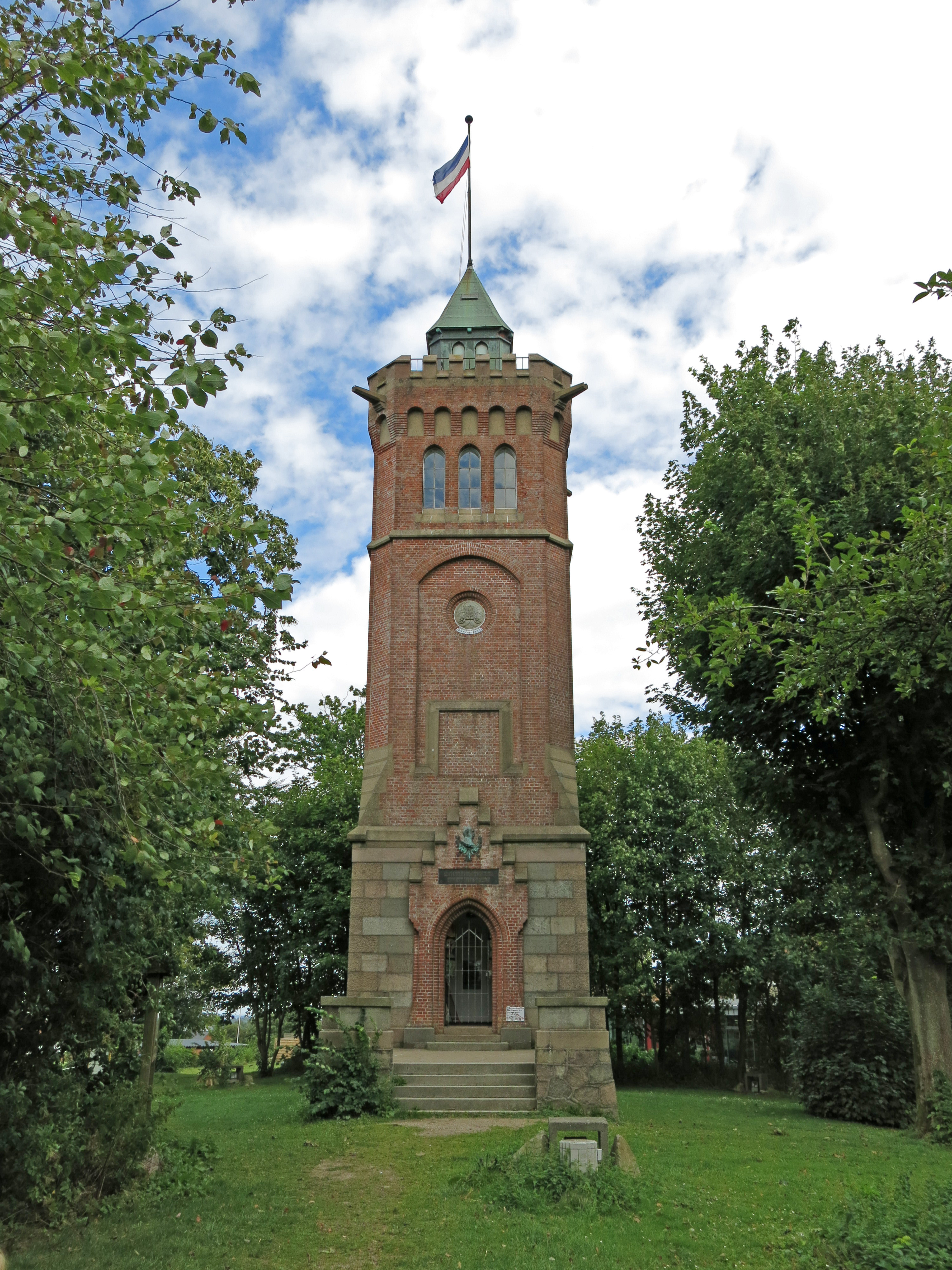 Der Bismarckturm auf dem Scheersberg bei Quern im Kreis Schleswig-Flensburg in Schleswig Holstein.